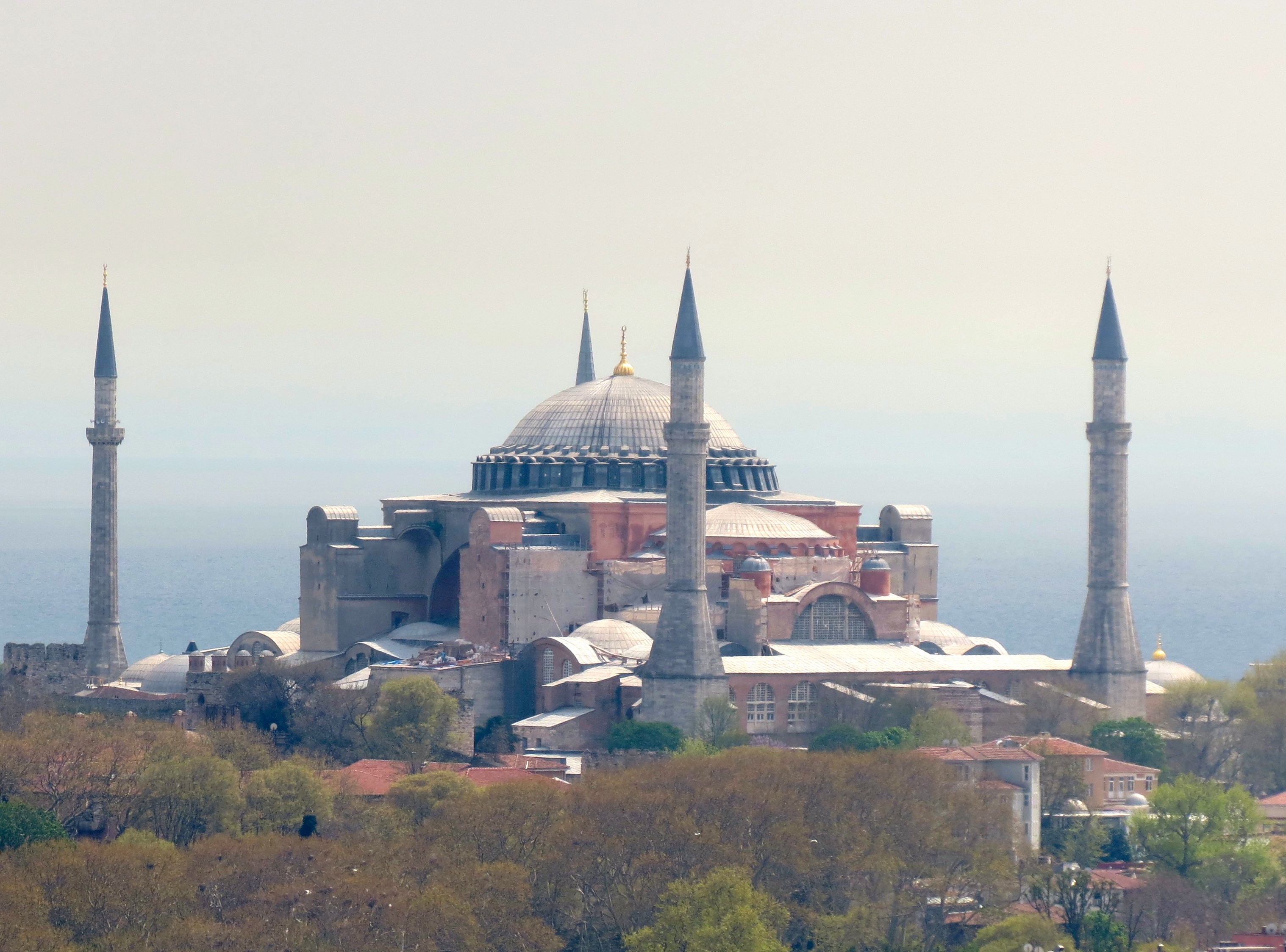 Hagia Sophia